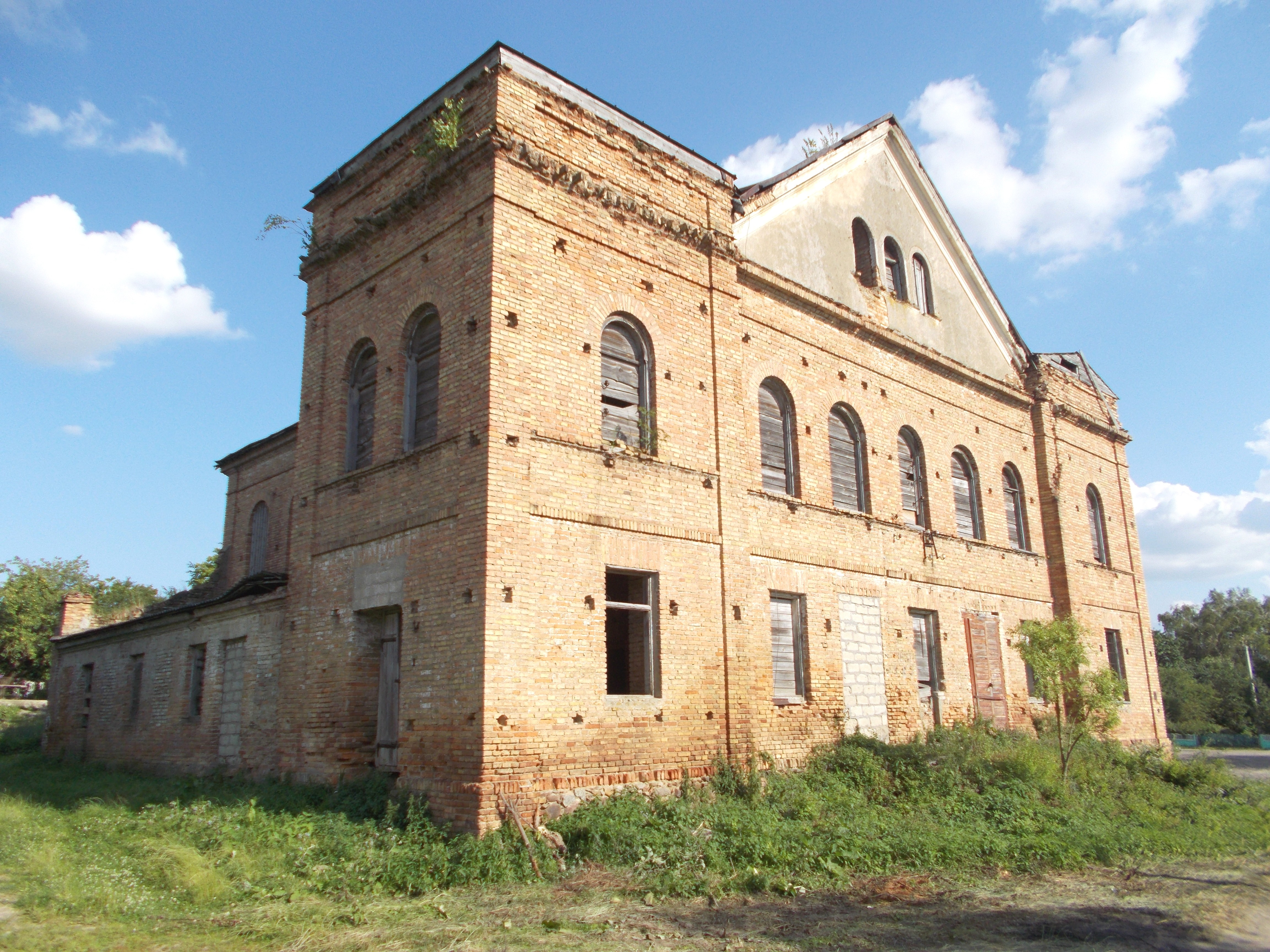 Синагога XVIII-XIX века в Индуре. Построена в 1883-м, по другим данным - в 1885 году. Была возведена на самом высоком в то время месте местечка. Фасад ориентирован на Иерусалим. Прекратила действовать к 1940-м годам. После Великой отечественной войны использовалась местным колхозом под склад для удобрений.